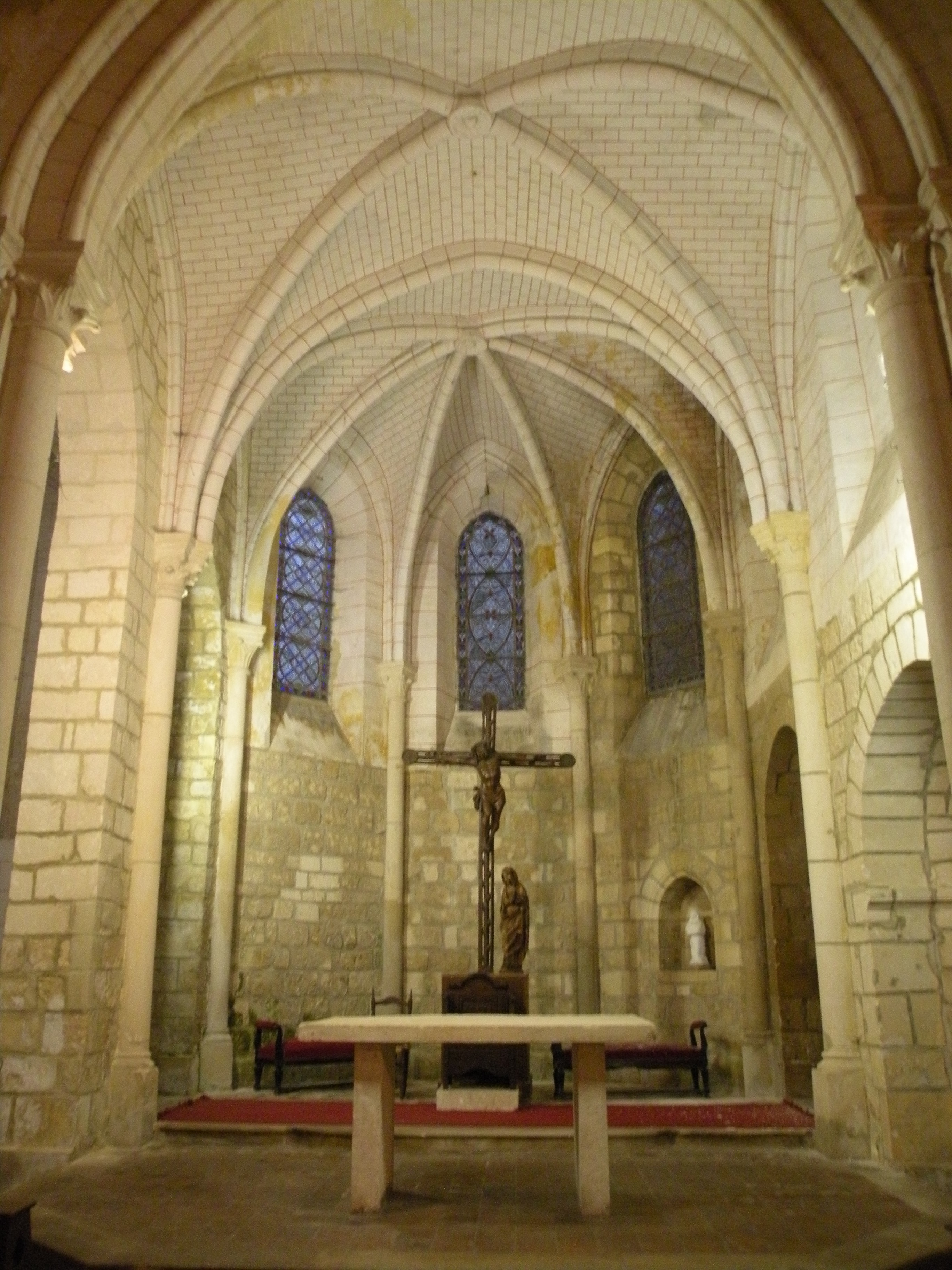 Intérieur de l'église Saint-Martin de Frouville